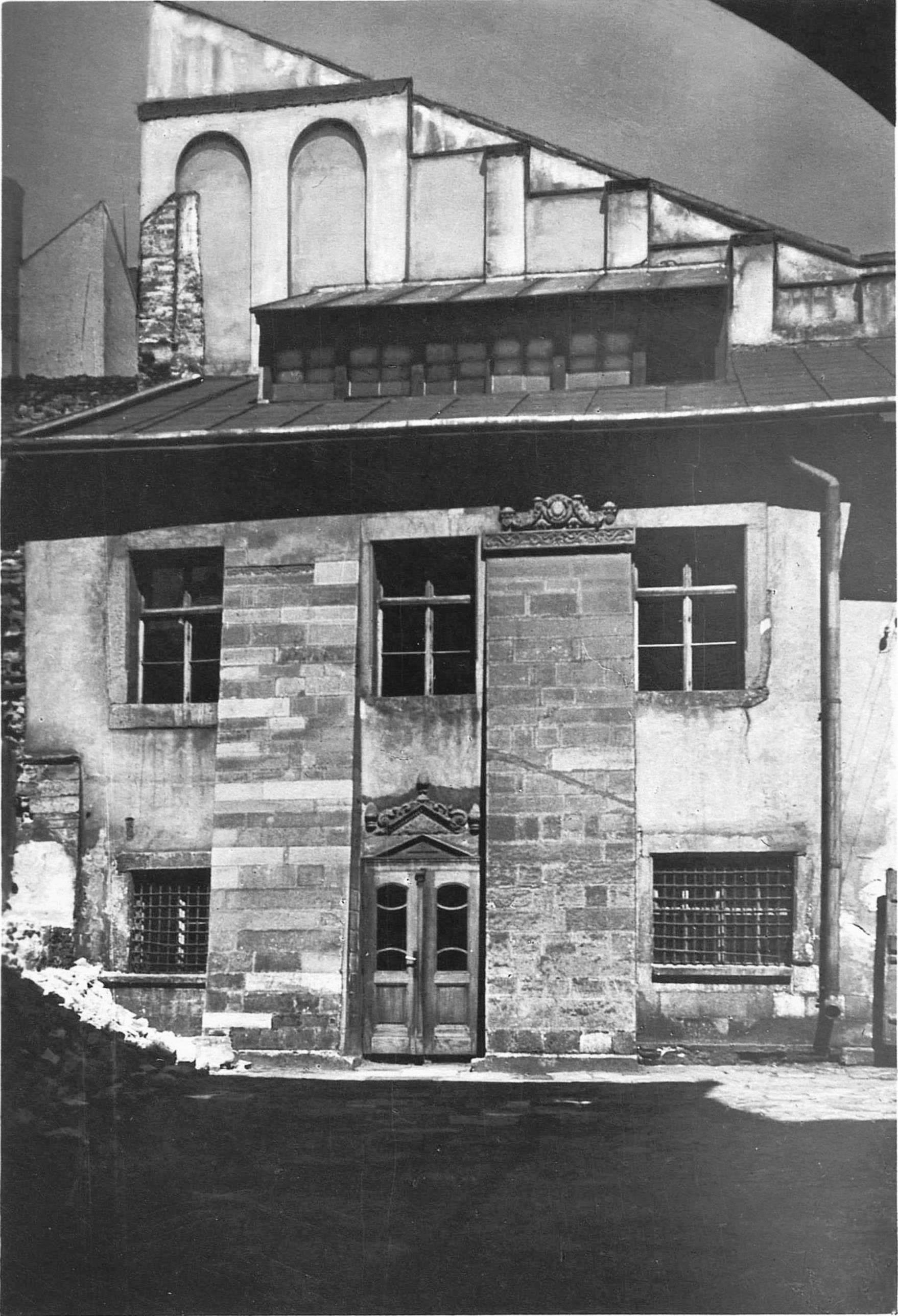 Синагога Золота Роза у Львові.